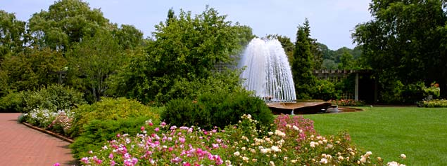 Chicago Botanic Garden Rose Garden